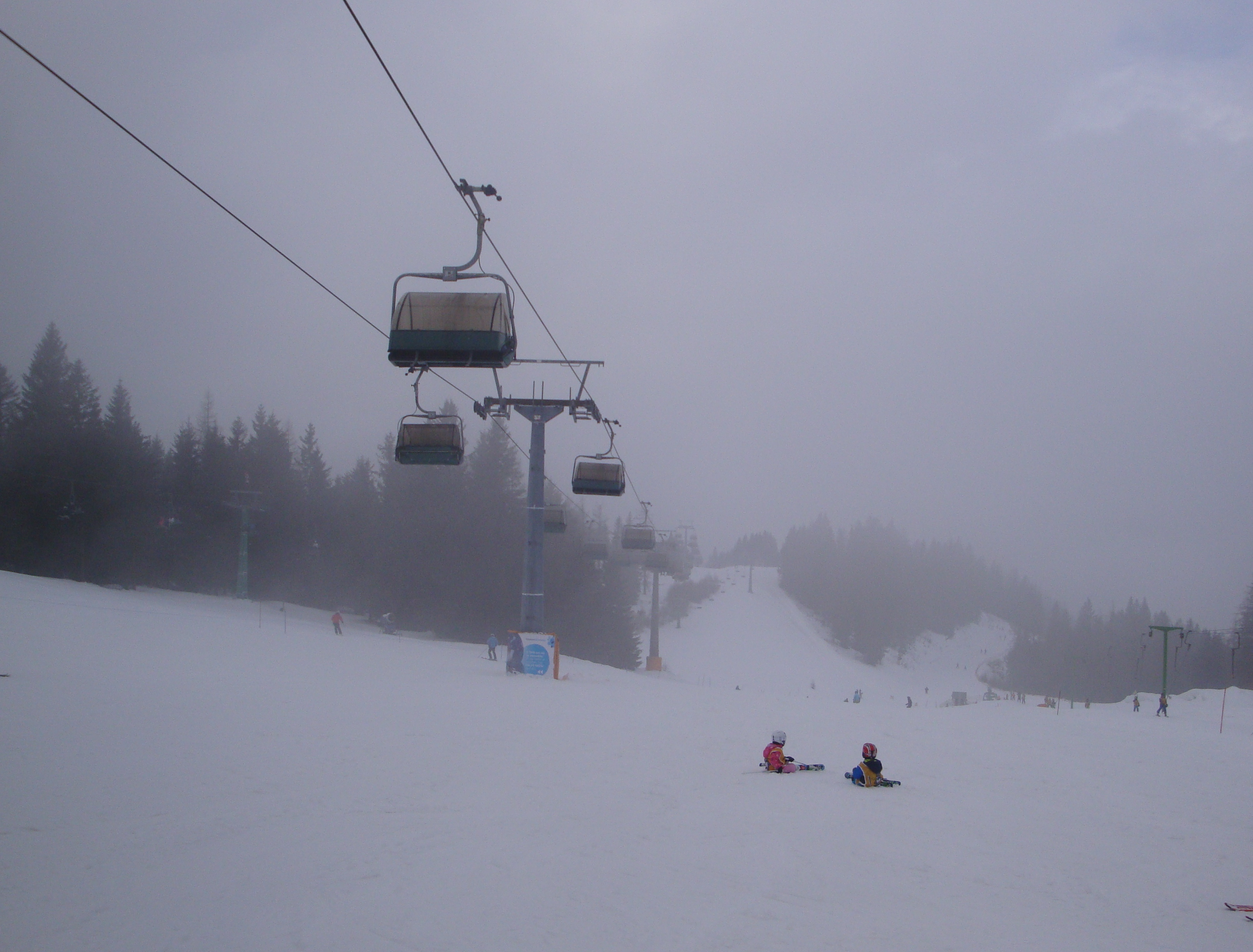 Smučišče Cerkno.